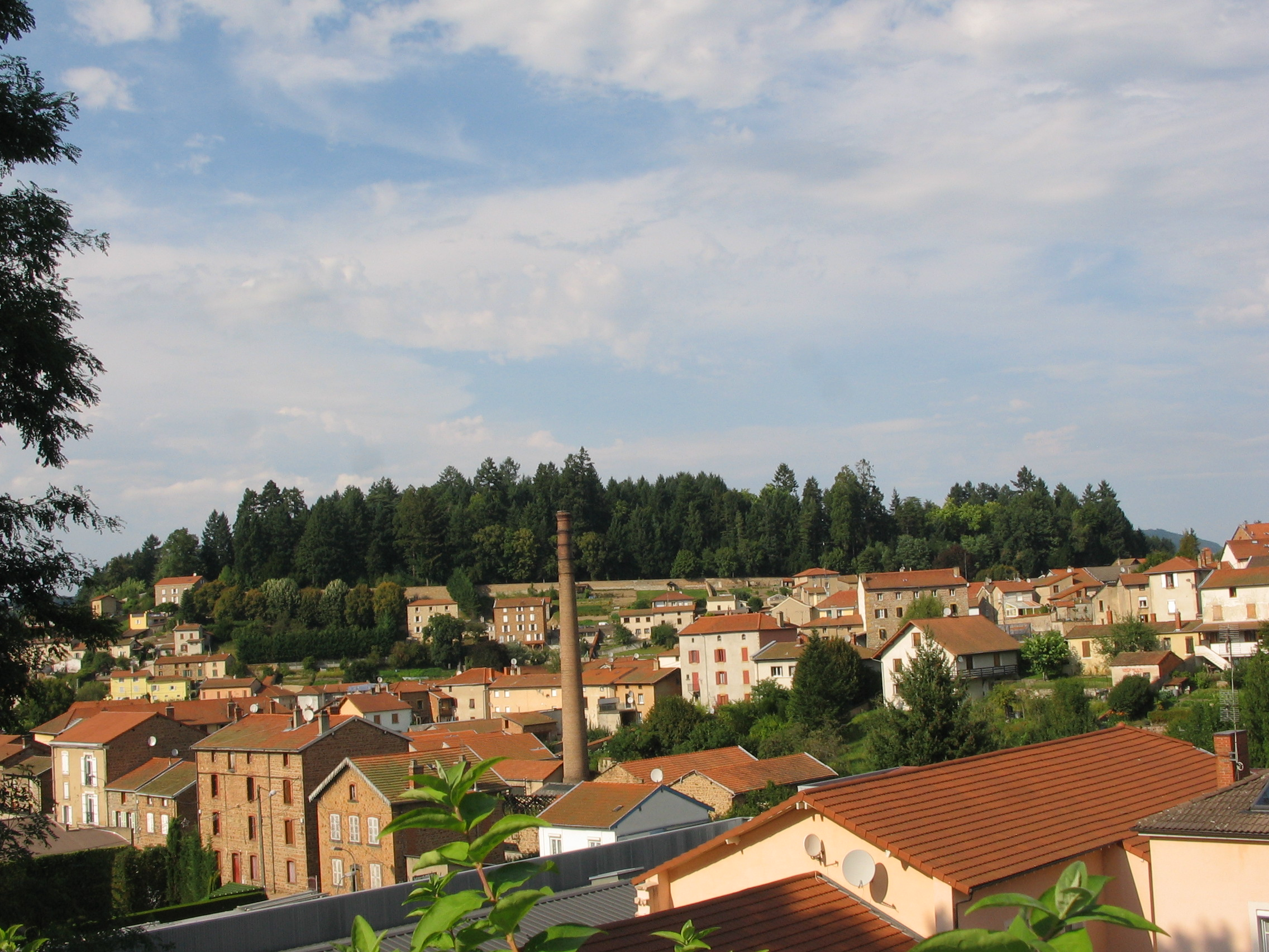 Amplepuis (Rhône), depuis parvis de la gare.